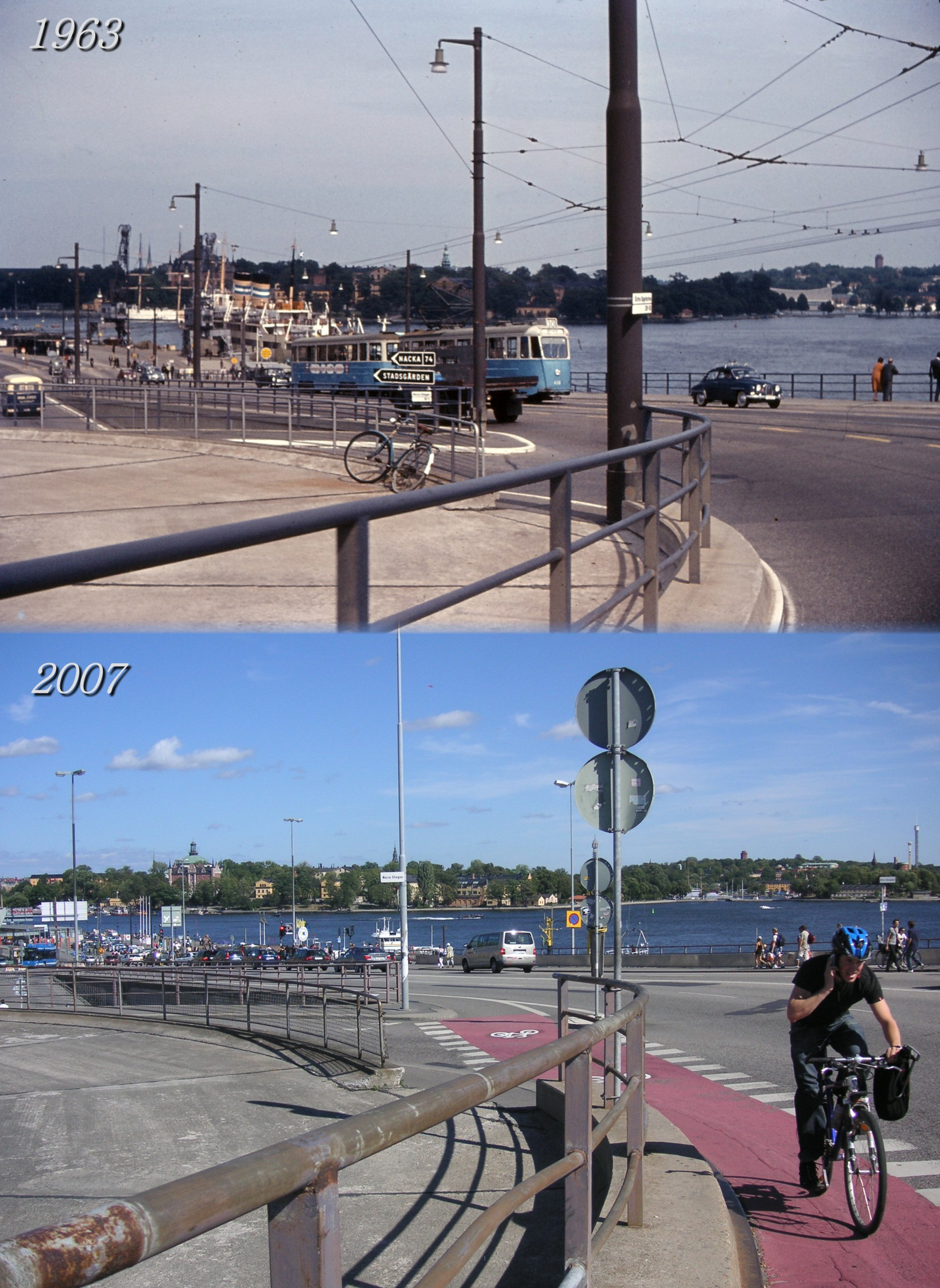 Slussen i Stockholm 1963 och 2007, övre bilden fortfarande med vänstertrafik.